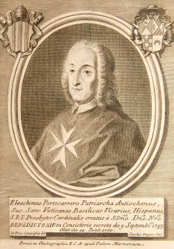 Cardenal Joaquín Fernández Portocarrero (1681-1760)